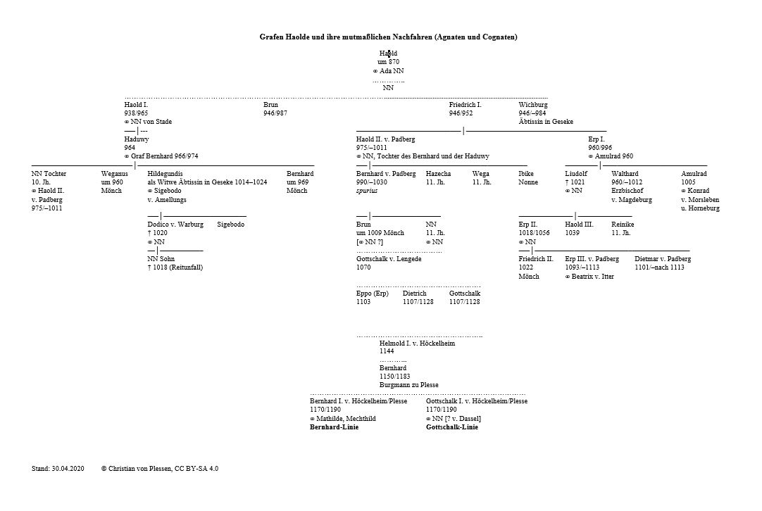 Stammtafel